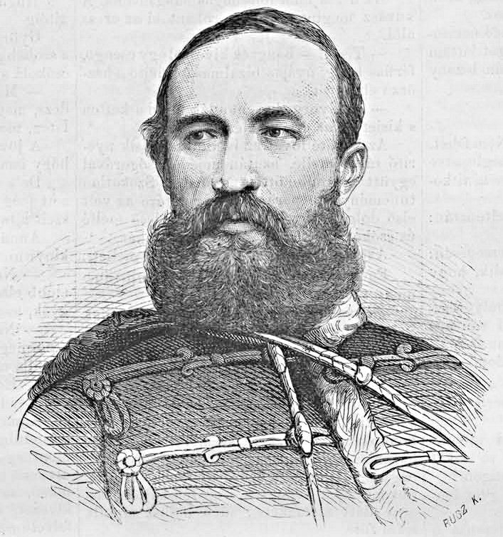 Figyelmessy Fülöp (1820–1907) honvéd őrnagy, amerikai ezredes. Rusz Károly metszete. (Vasárnapi Ujság, 1868. március 1.)